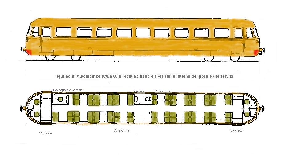 Disegno di una Automotrice